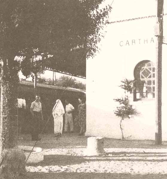 La gare de TGM de Carthage entre 1940 et 1945, Tunisie